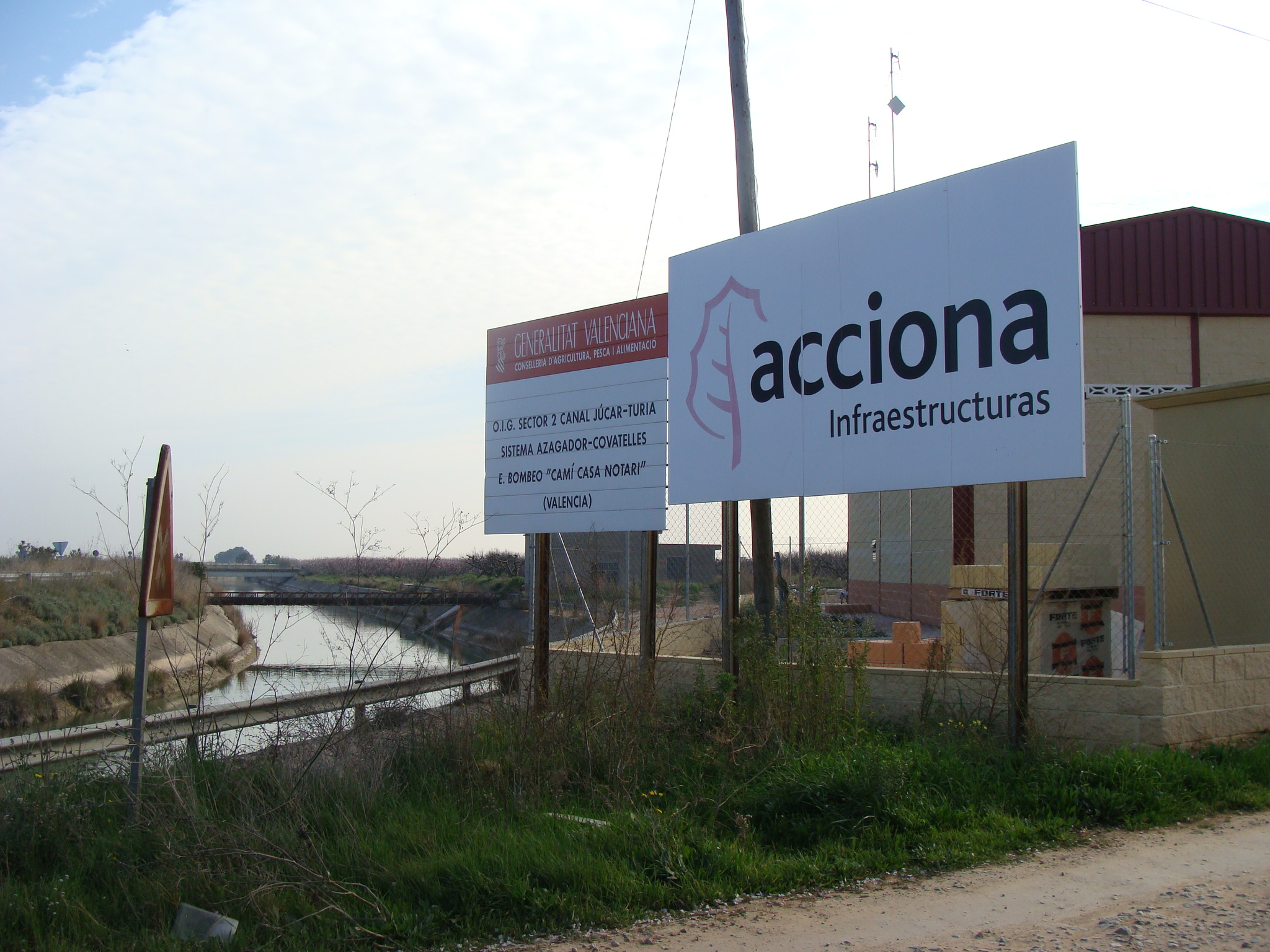 El Canal Júcar - Turia en el punto donde cruza la carretera CV - 50 en el término municipal de Carlet